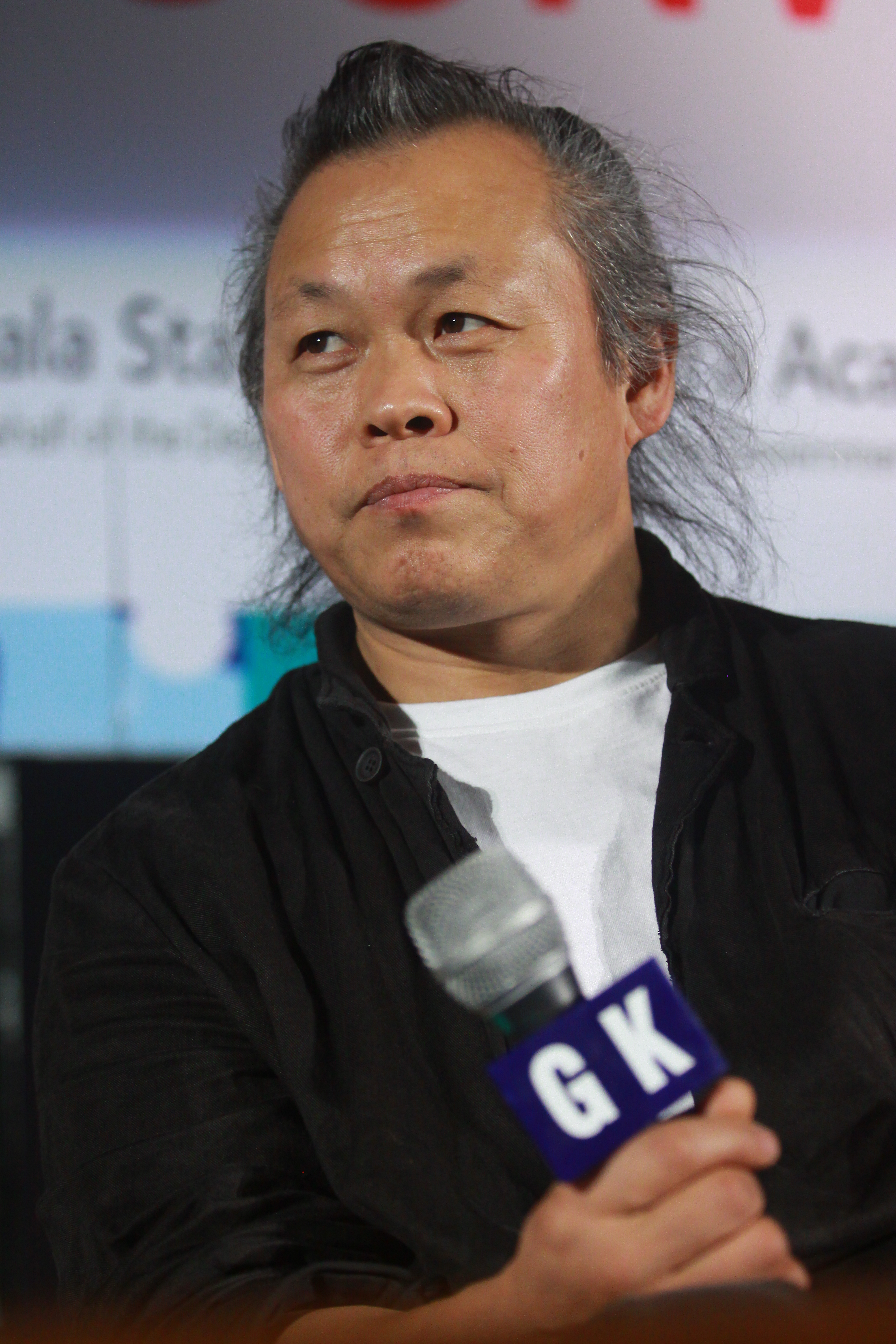 2013ലെ തിരുവനന്തപുരം അന്താരാഷ്ട്ര ചലച്ചിത്രോത്സവത്തില്‍